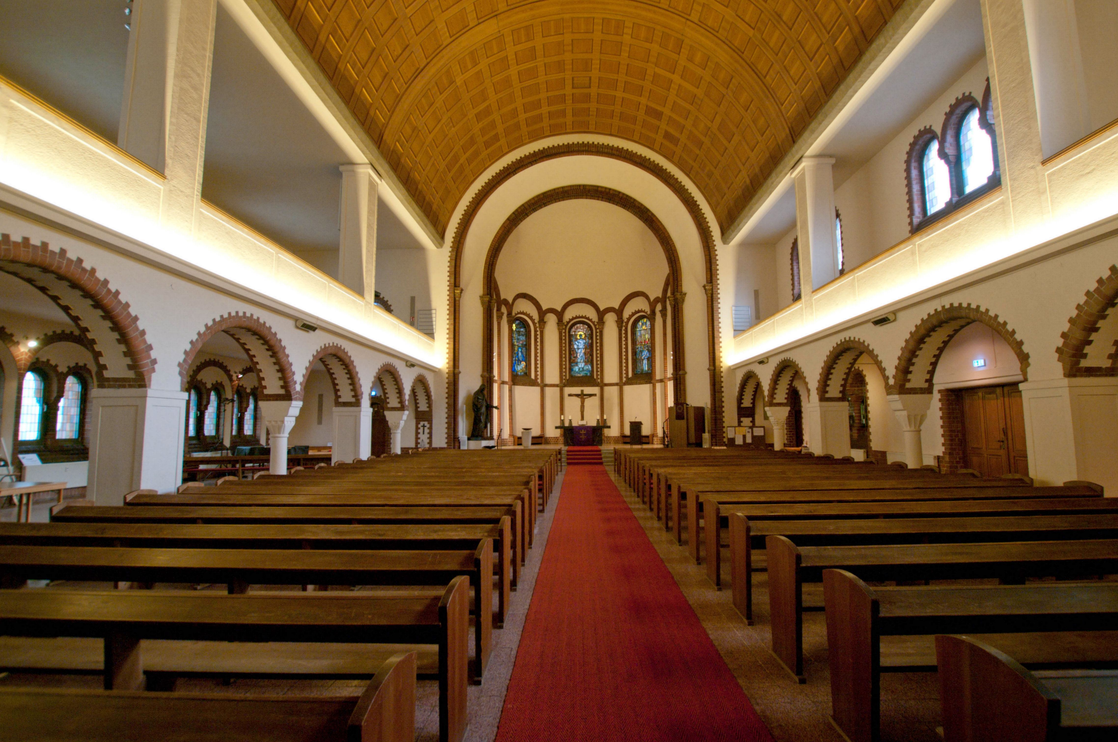 Innenraum der Kapernaumkiche, Berlin-Wedding